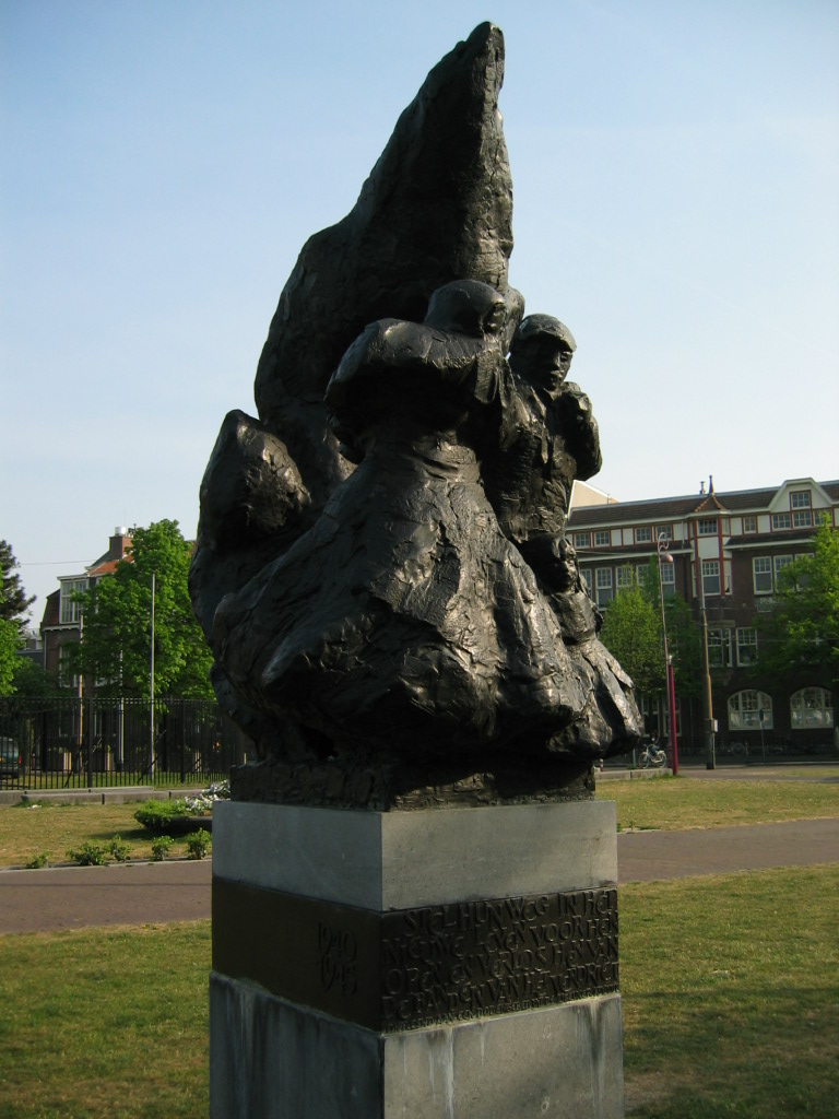 Foto van het Zigeunermonument Hel en vuur op het Amsterdamse Museumplein